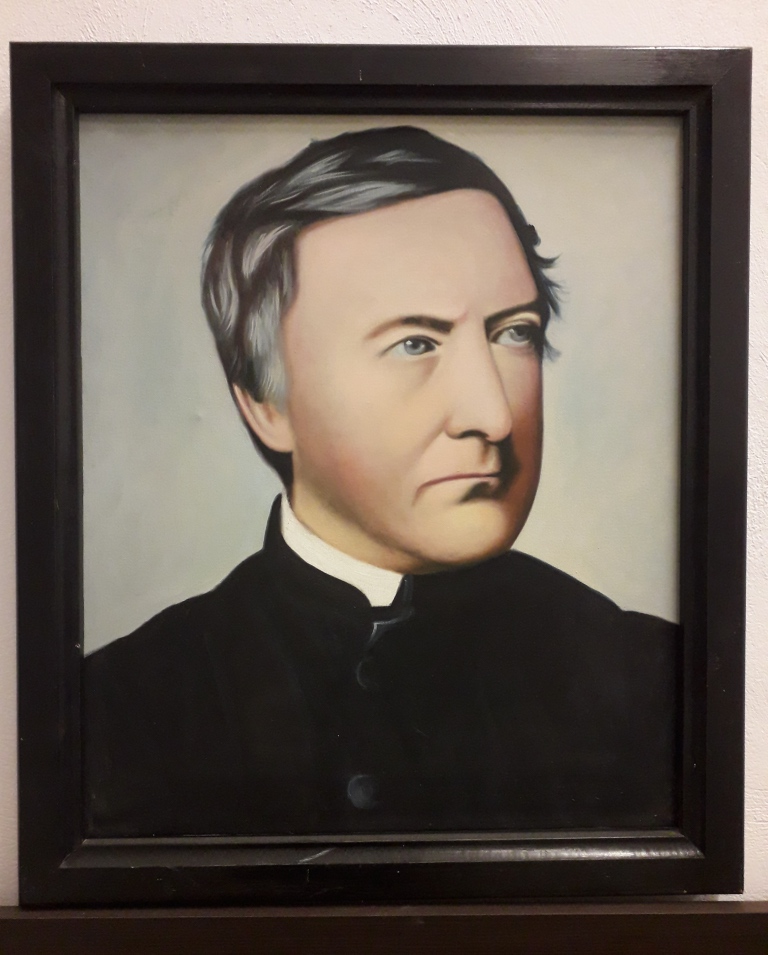 Friedrich Michelis (1815-1866) ein deutscher Philosoph und Theologe, Braunsberger Landesmuseum, niemiecki teolog i filozof, Muzeum Ziemi Braniewskiej